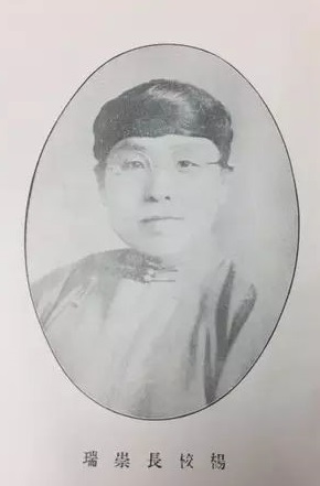 中文（中国大陆）: 第一助產學校楊崇瑞校長